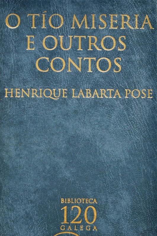 Detalle da portada dun volume de O tío Miseria e outros contos de Henrique Labarta Pose, da Biblioteca Galega 120.